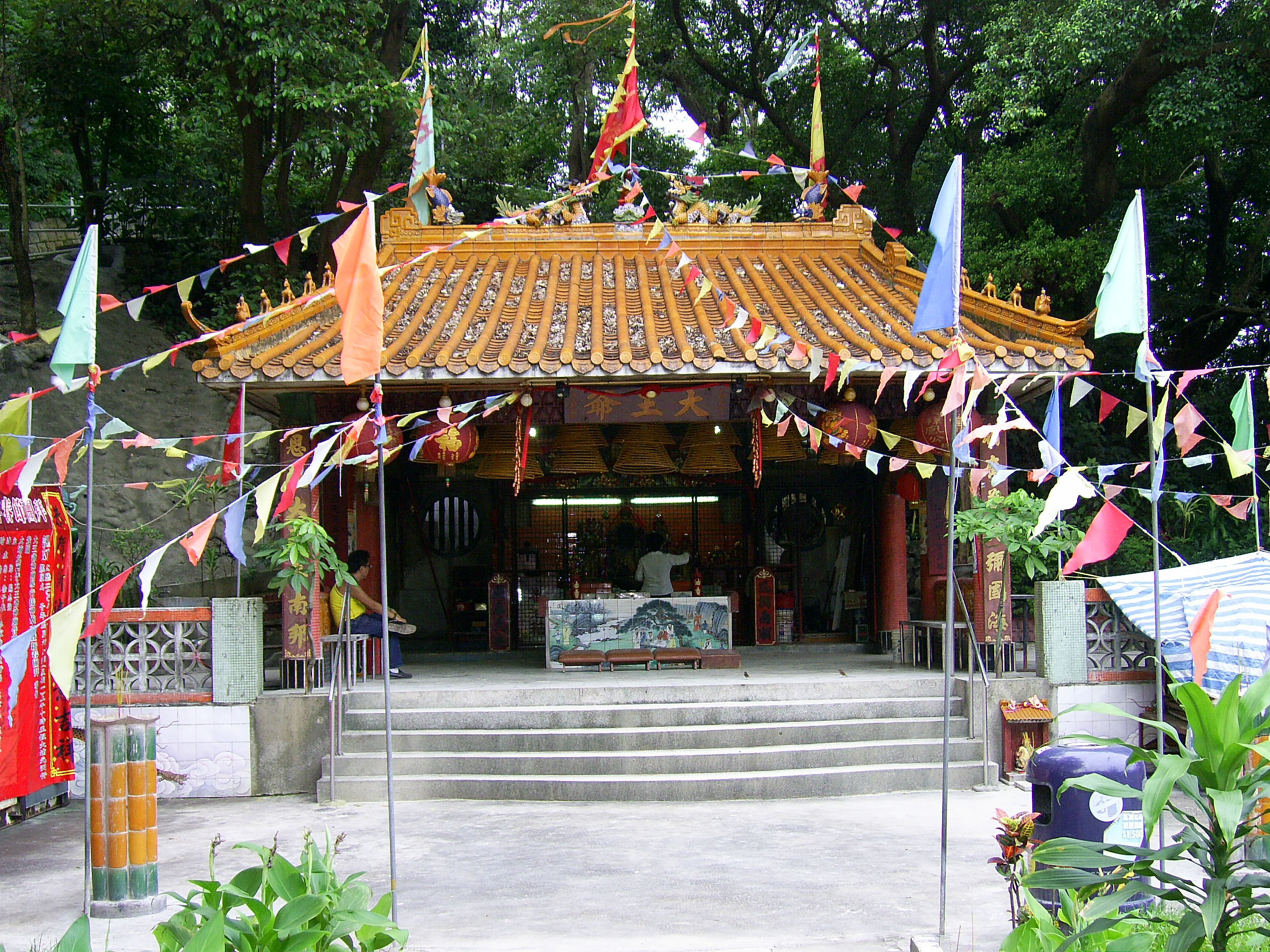 中文（香港）: 元洲仔大王爺廟